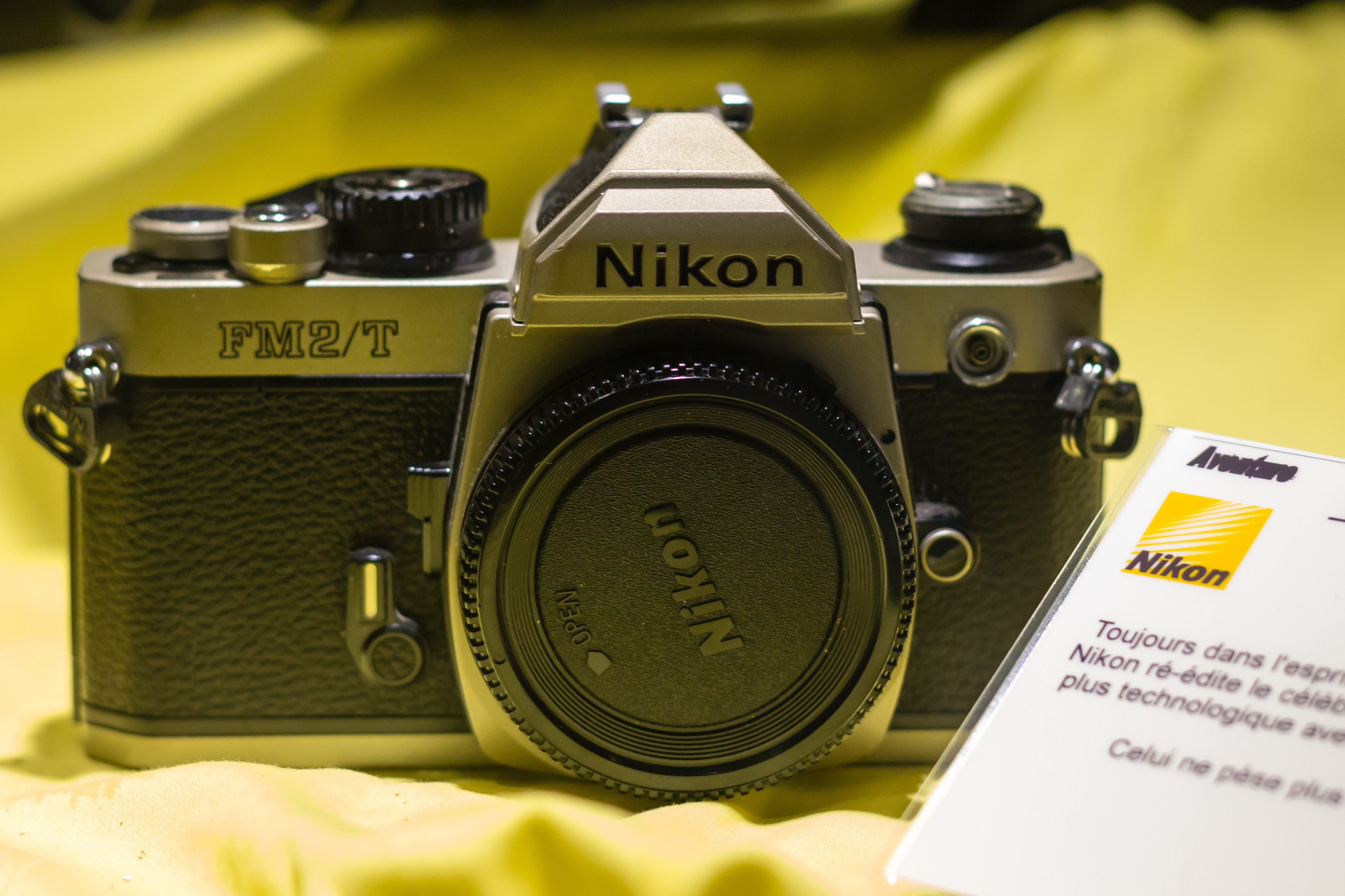 Boîtier Nikon FM2 en titane.